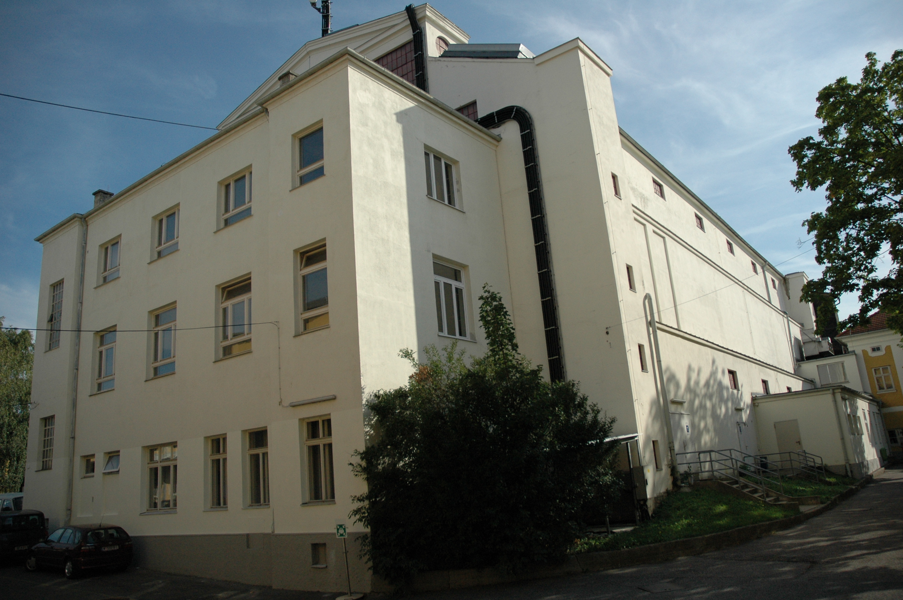 Schrägansicht der Haupthalle der Wiener Rosenhügel Filmateliers (heute Filmstadt Wien) / Vienna Rosenhügel Film studios (main hall / "Halle 1")